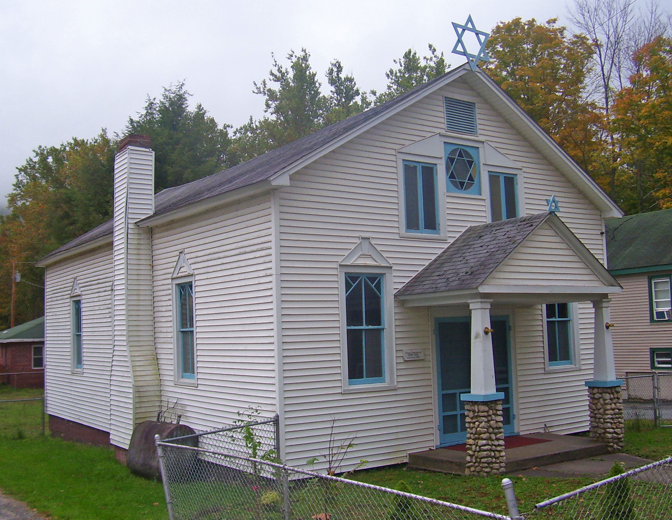 Spring Glen Synagogue, Spring Glen, NY, USA